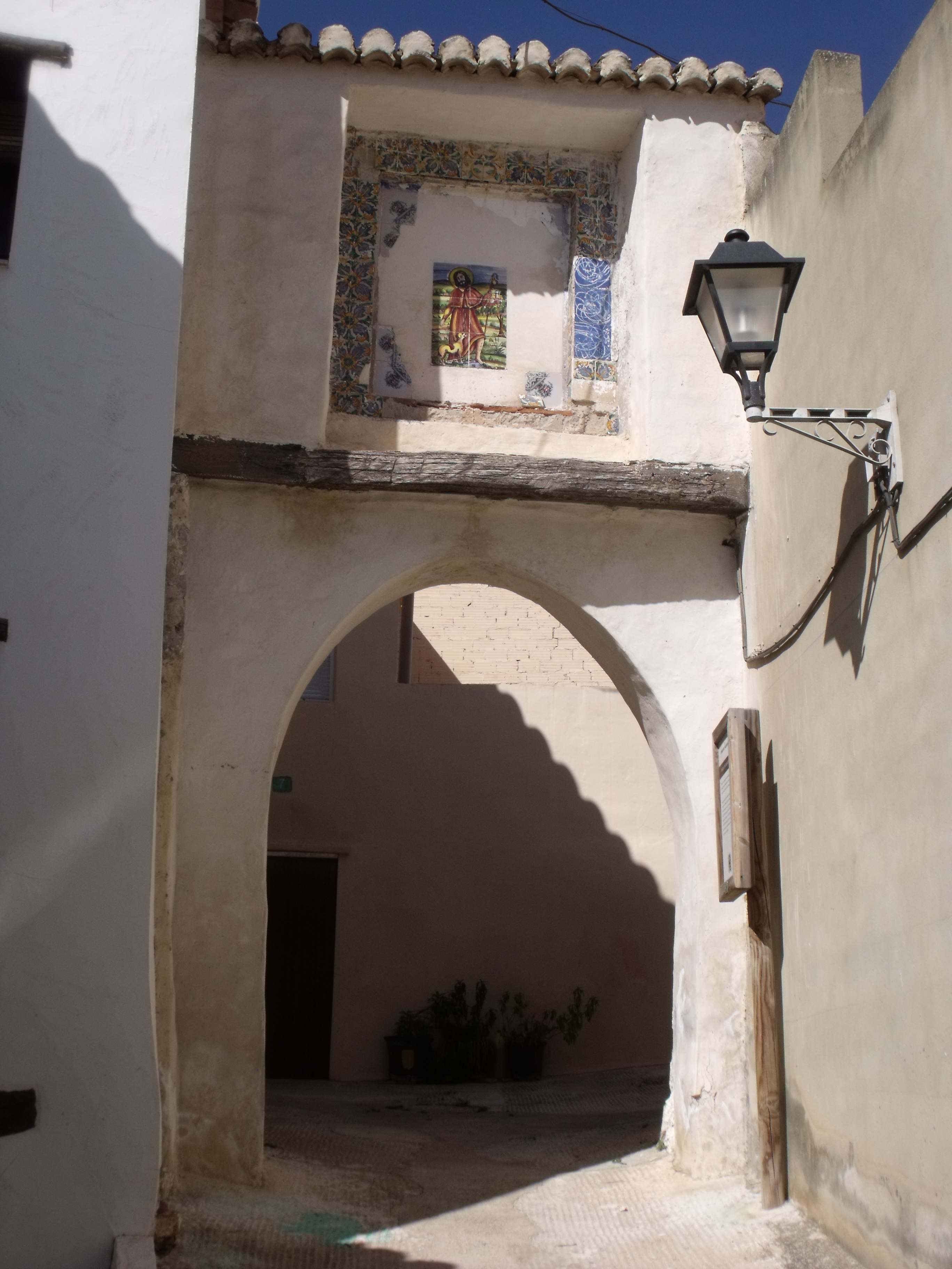 Vistas del Portal de los Santos, san Roque y san Cristóbal